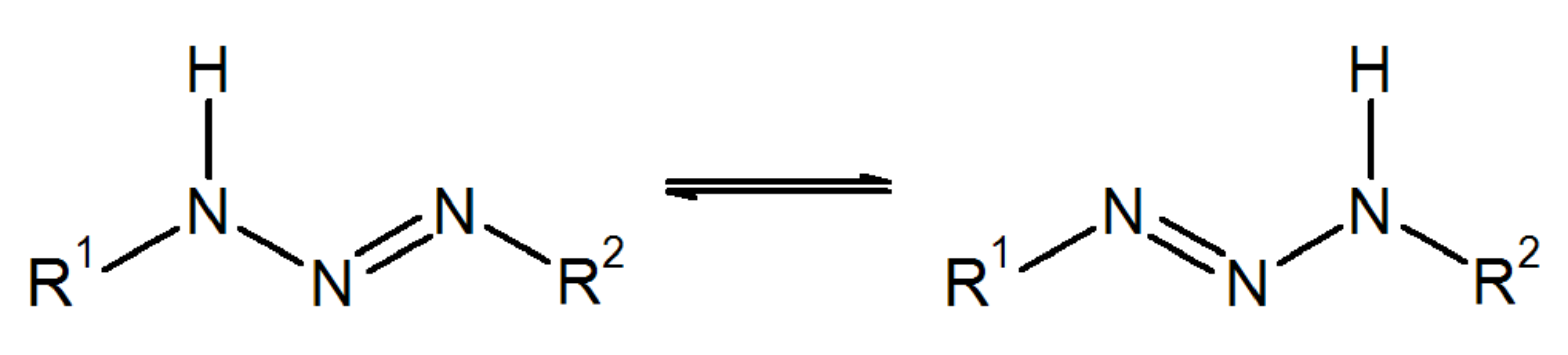 Triazen